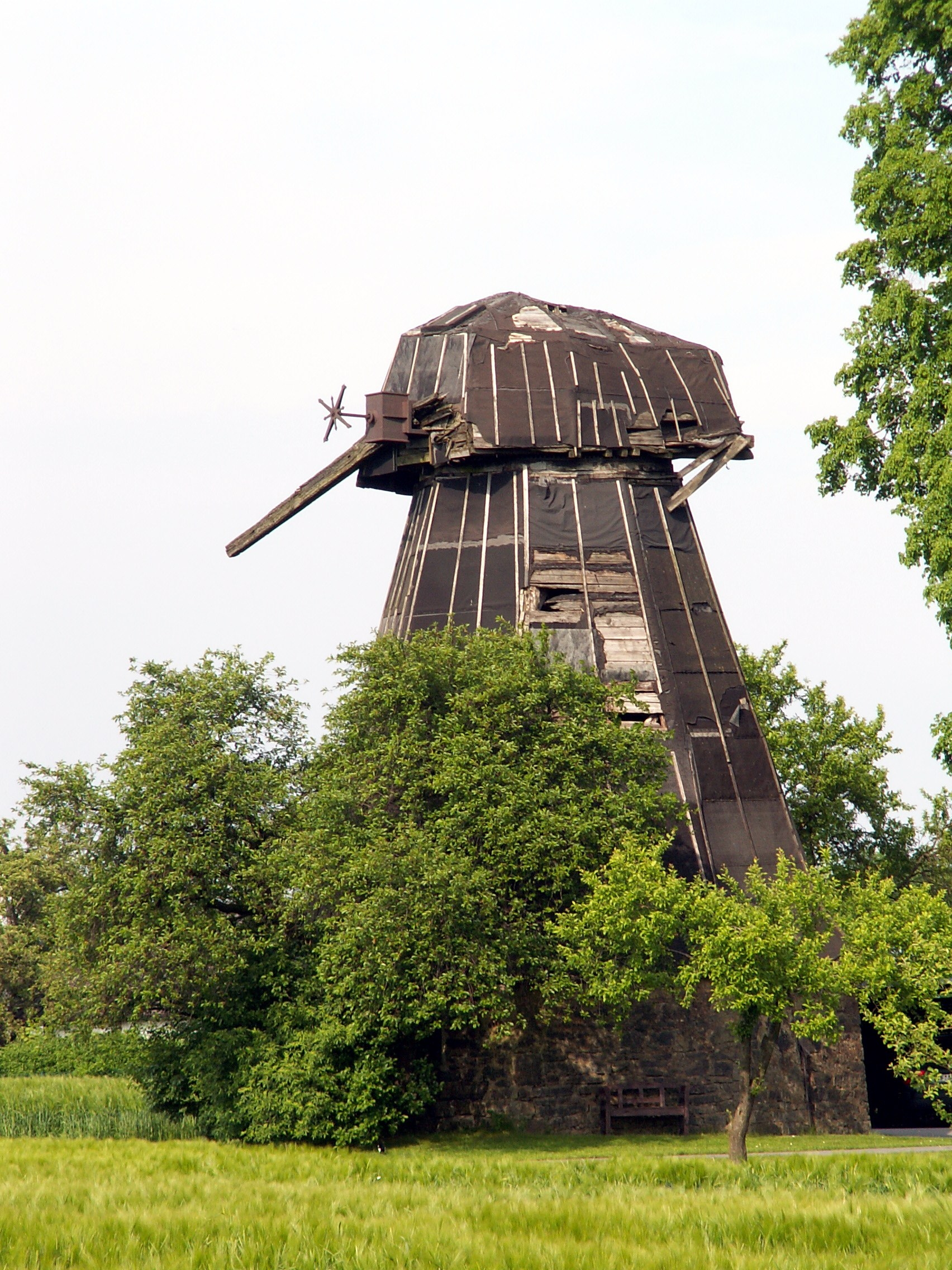 Windmühle in Enger, Stadtteil Dreyen, Meller Str. 229, Ansicht von Westen This is a photograph of an architectural monument.